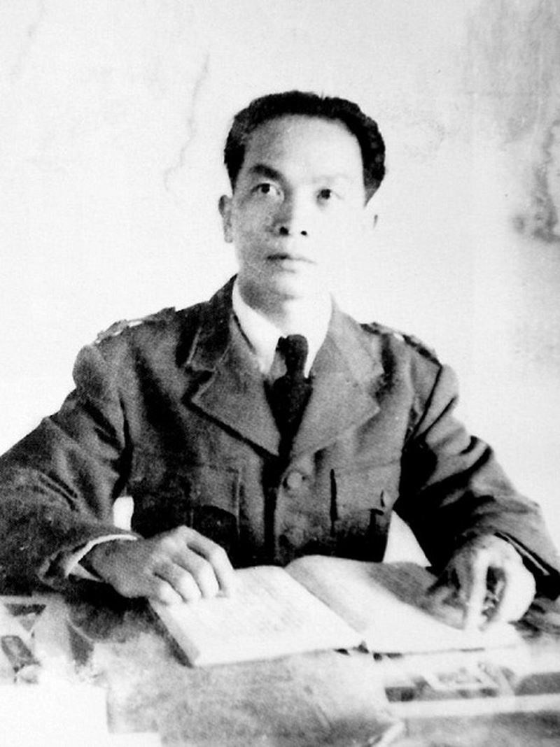 第一次インドシナ戦争の頃のザップ。